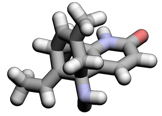 3d molecular spacefill of Huperzine A